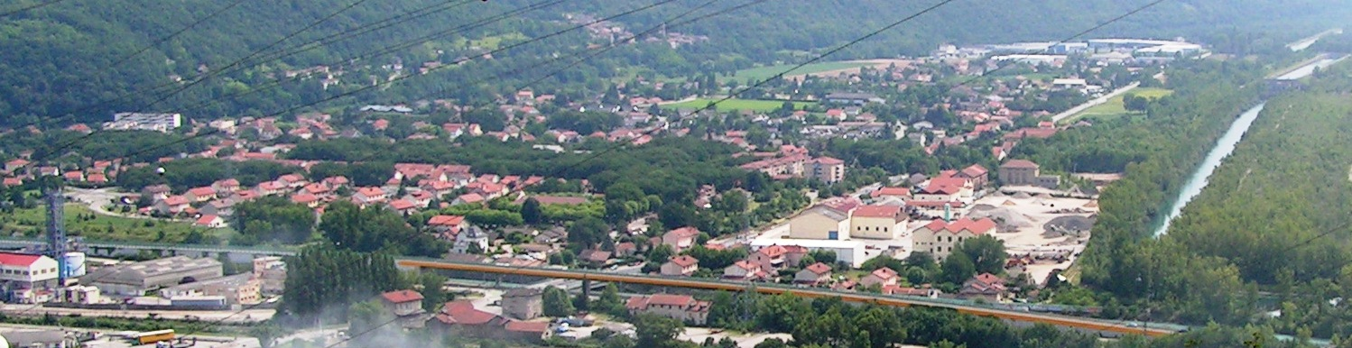 Panorama de la ville de Champ-sur-Drac, depuis le site du "Saut du Moine".